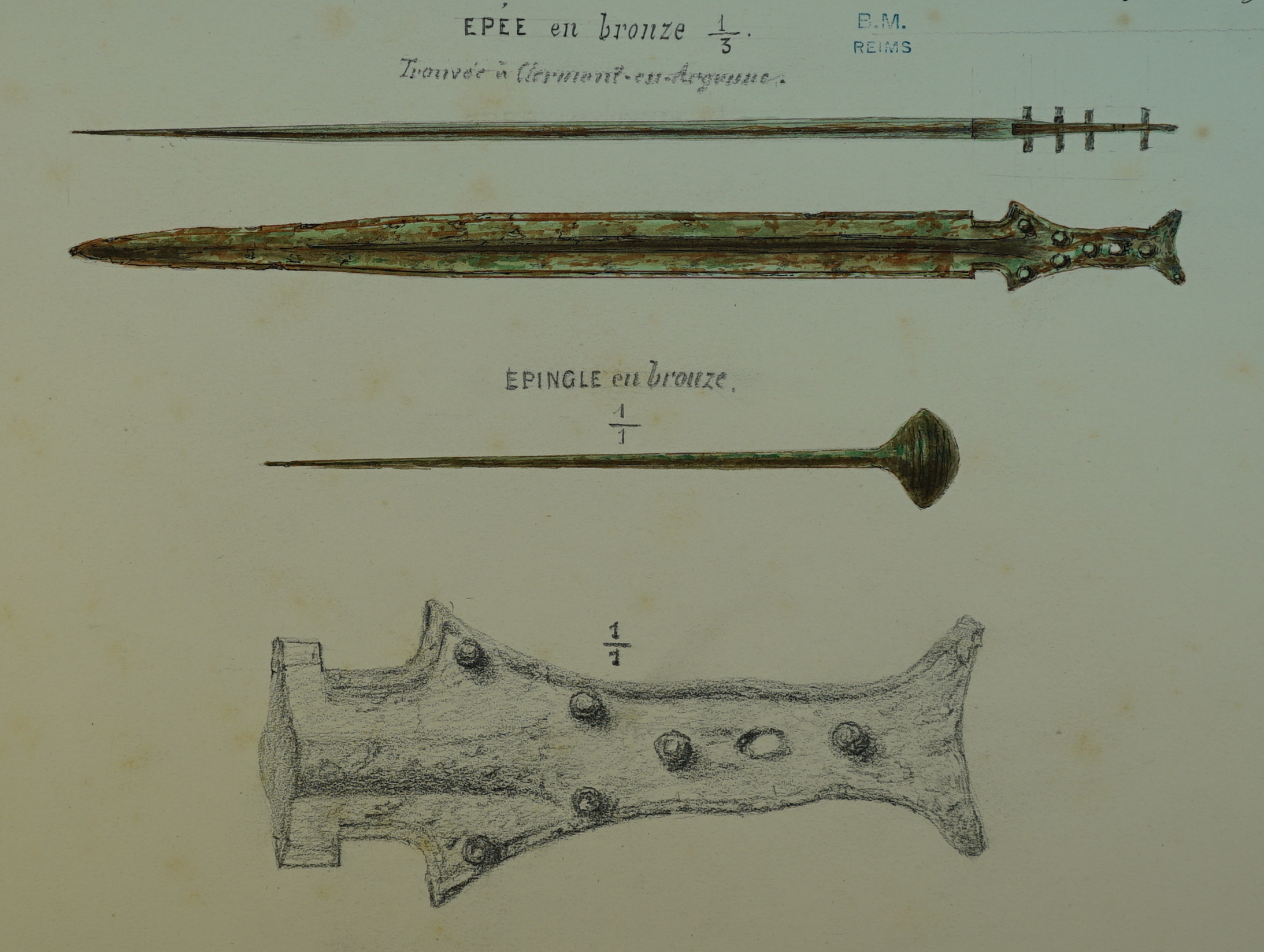 travail d edessin pour la colelction Morel.